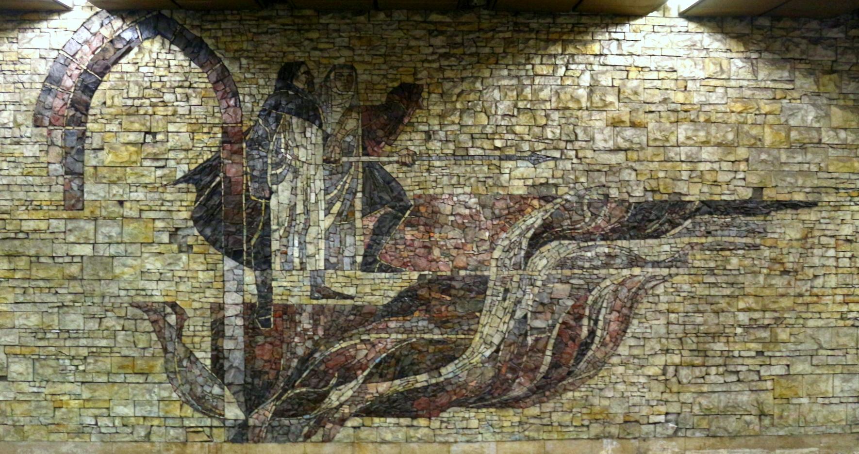 Praha, stanice metra Želivského